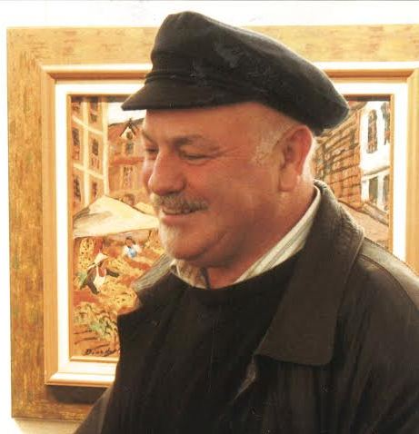 El pintor español Díaz de Orosia